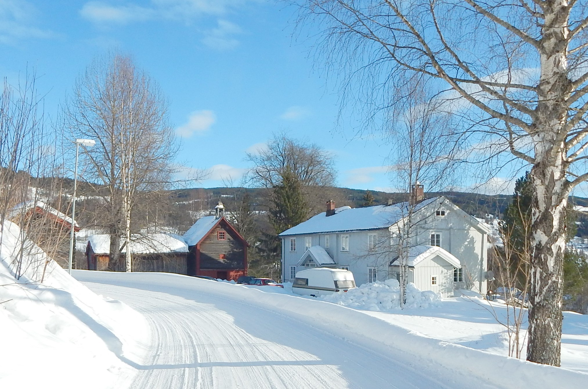 Vestre Gausdal prestegård på Forset